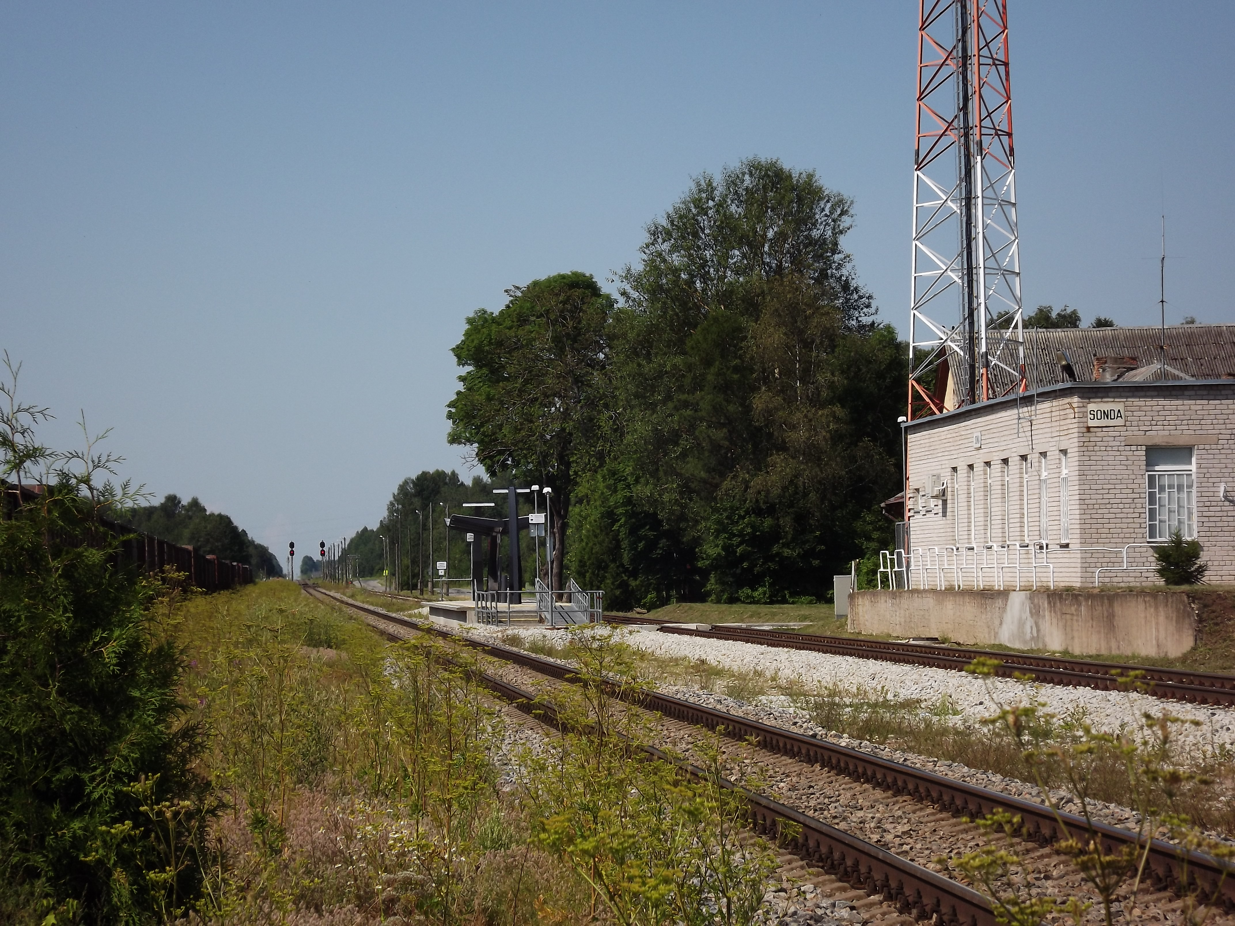 Sonda raudteejaam vaatega Tallinna suunas.